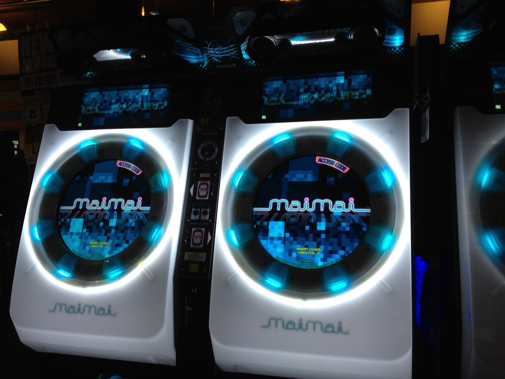 maimai